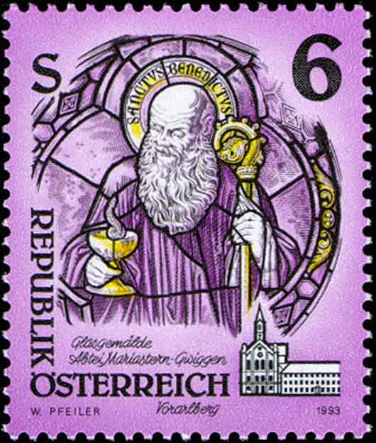 Glasgemälde des Hl Benedikt von Nursia in der Zisterzienserinnenabtei Mariastern-Gwiggen, Hohenweiler, Vorarlberg, Austria auf Briefmarke der Republik Österreich aus 1993